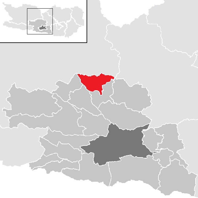 Bezirk Villach-Land